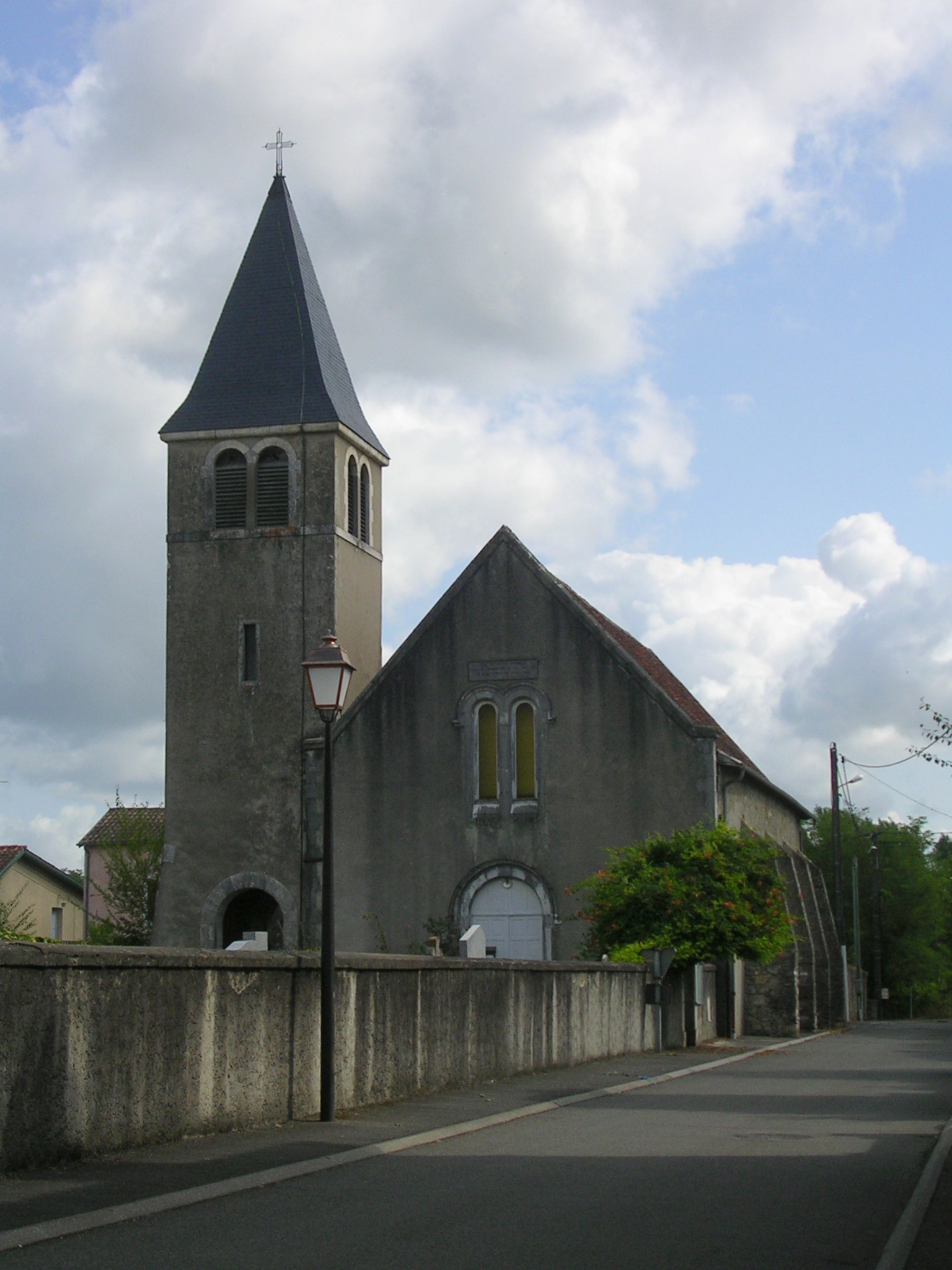 Temple protestant de Bellocq, dans le département français des Pyrénées-Atlantqiues